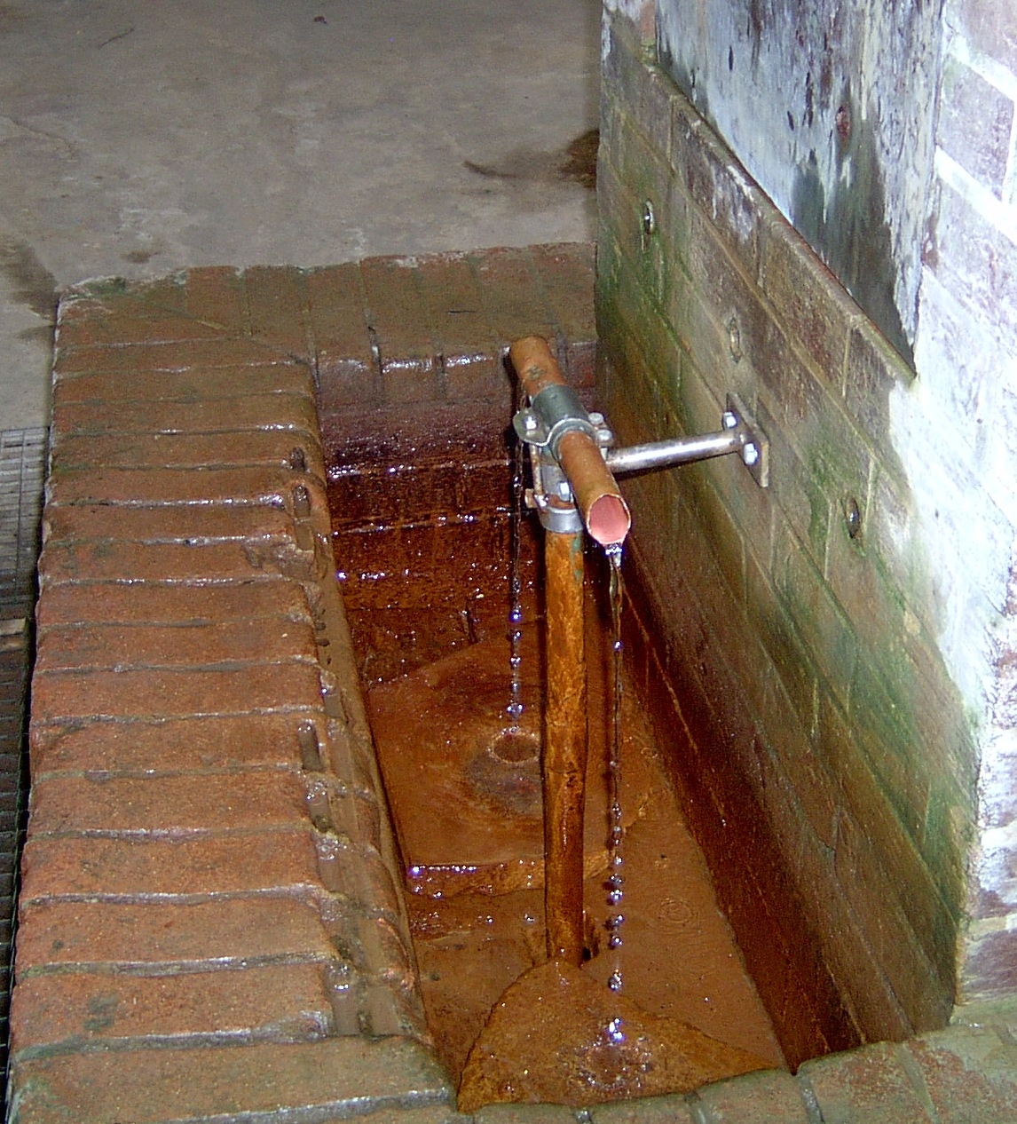 Lindenholzhausen, Germany, Sauerbrunnen, Seite